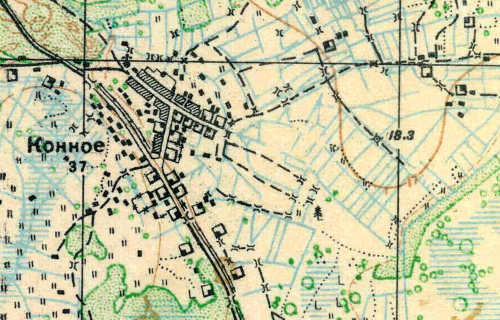 Топографическая карта Ленинградской области, квадрат О-35-9-В-в (Тисколово), деревня Конново